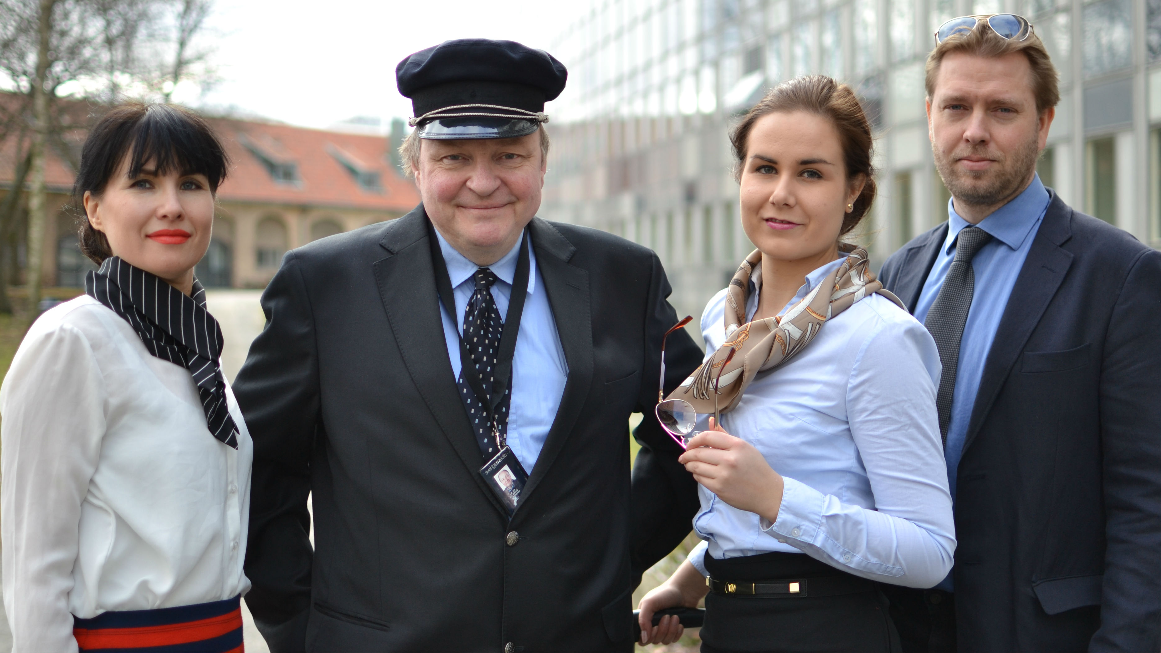 Tuottaja Hanna Lindberg, juontajat Jorma Ikäheimo ja Marika Pietilä sekä tuottaja Taneli Männikkö.